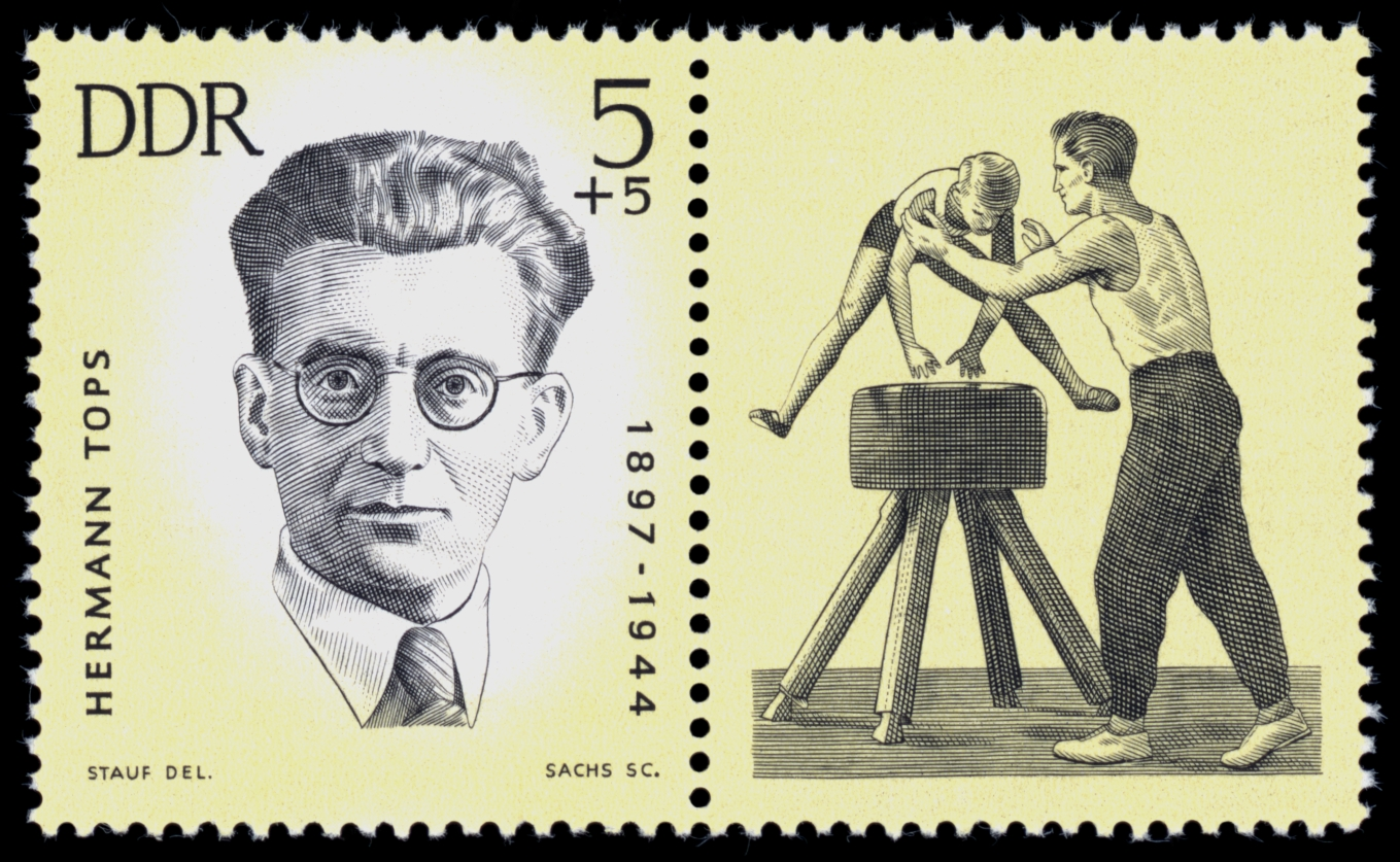 Information: Ausgabepreis: Pfennig First Day of Issue / Erstausgabetag: Auflage: Entwurf: Druckverfahren: Michel-Katalog-Nr: Ländercode-MiNr